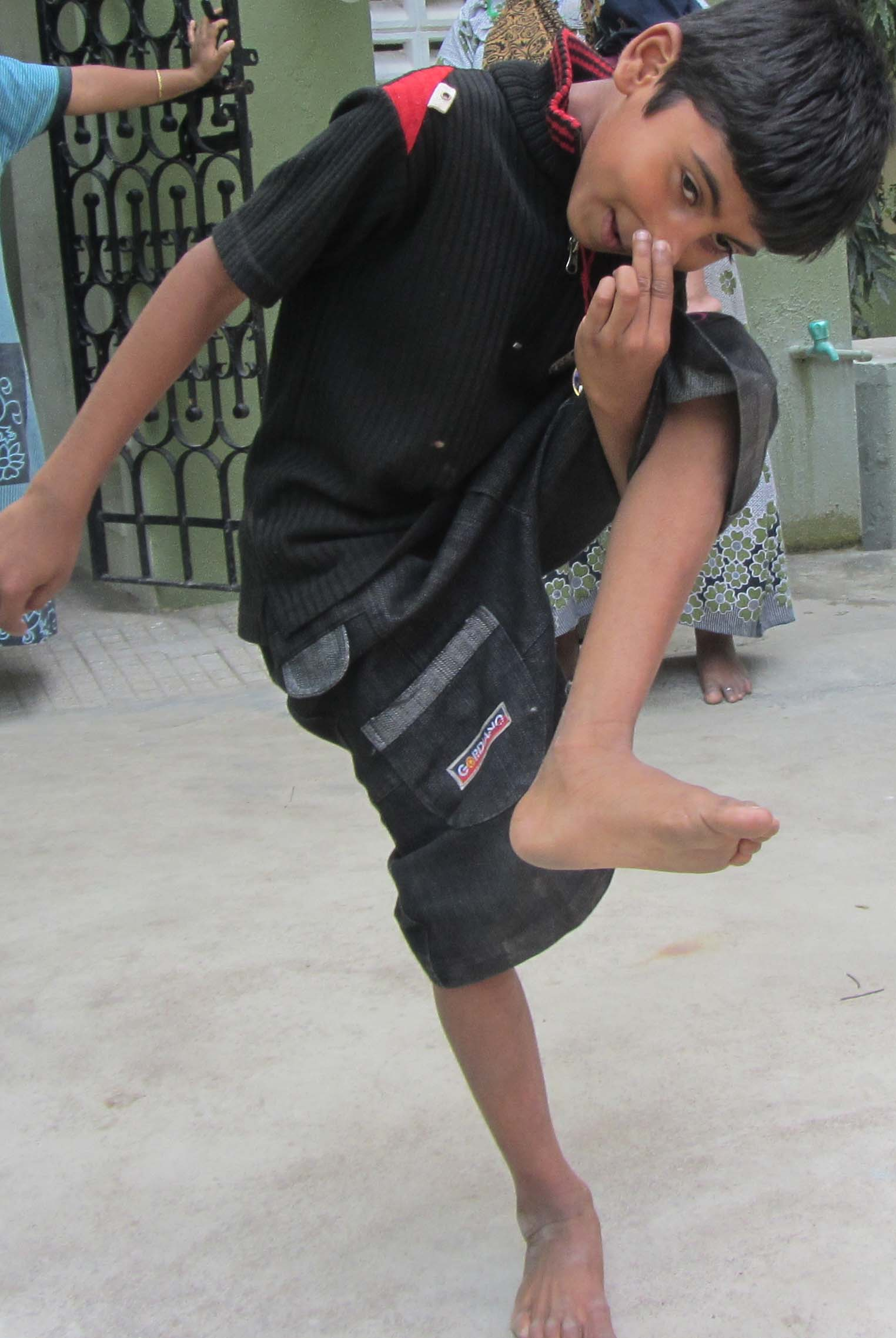 own shot - துரத்திப் பிடி விளையாட்டில் சிறுவர் இவ்வாறு மூக்கைப் பிடித்துக்கொண்டு நிற்பவரைத் தொடக்கூடாது.